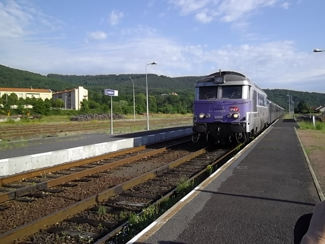 Le train touristique en gare de Langeac